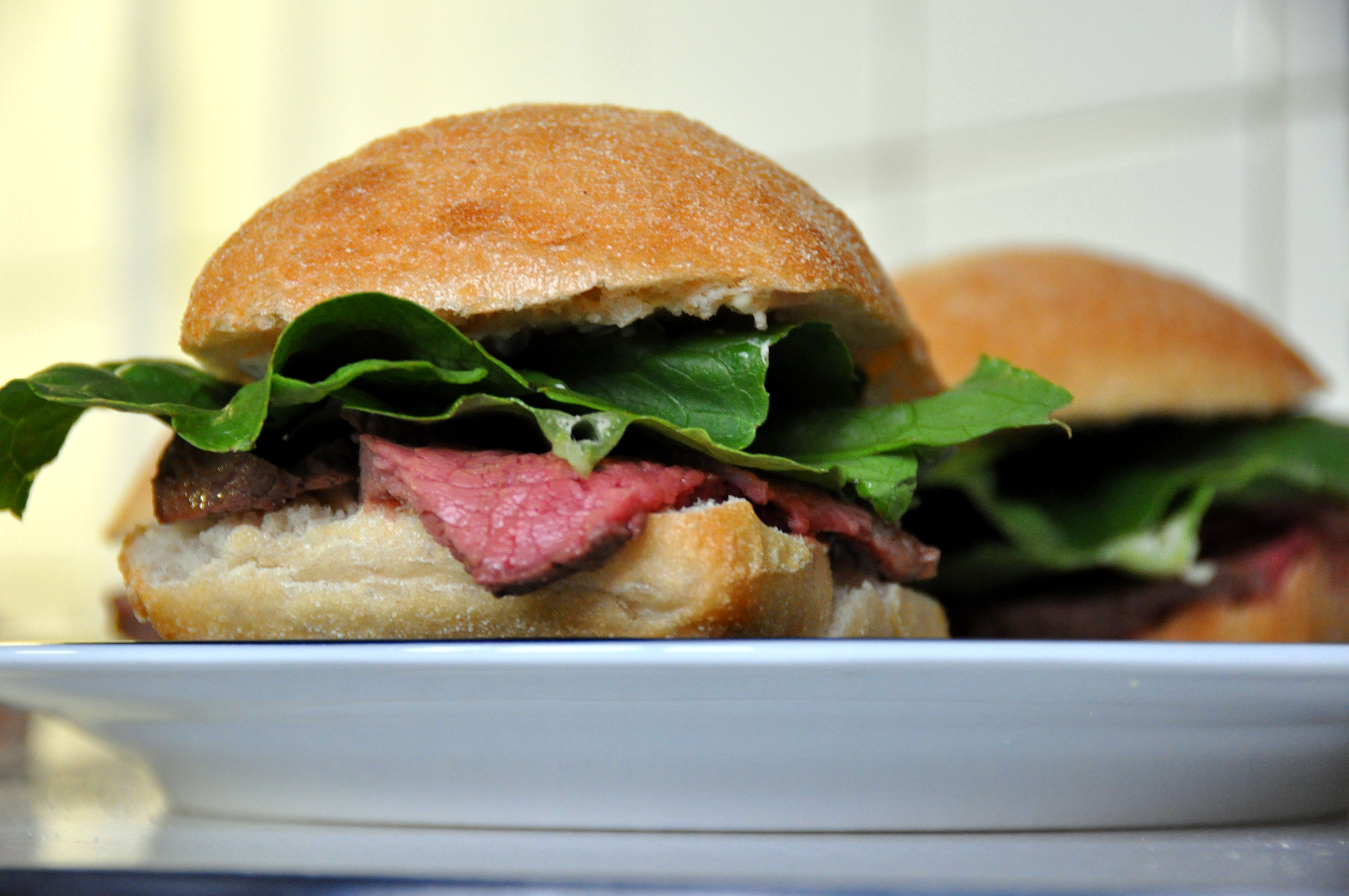 Sandwich med oksecuvette, romainesalat og dressing med peberrod, hvidløg og sennep